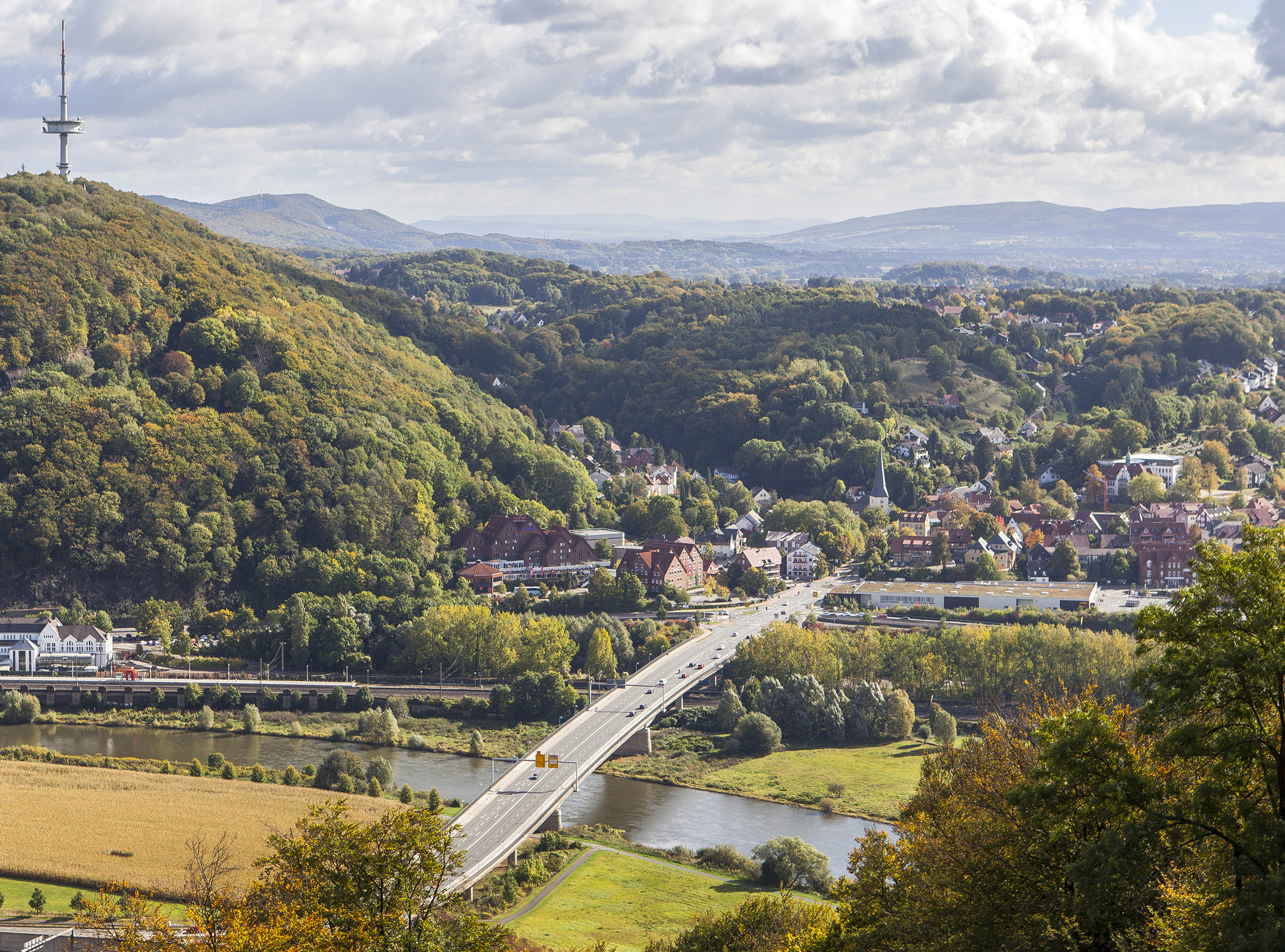 Ansicht vom Wittekindsberg auf den Jakobsberg mit Sendeturm (links) und Hausberge (rechts). Im Vordergrund die Weser.